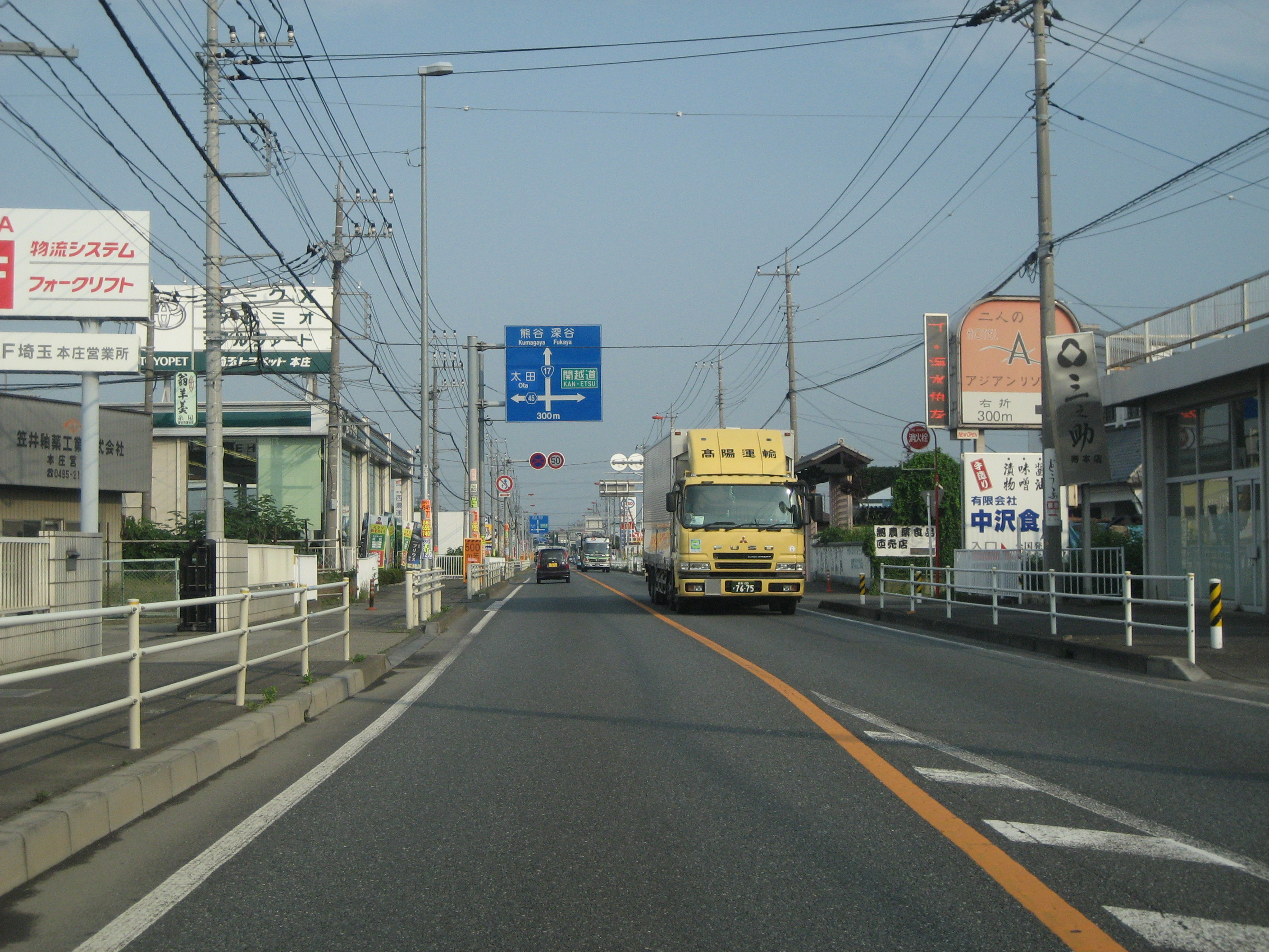 国道17号線埼玉県本庄市内